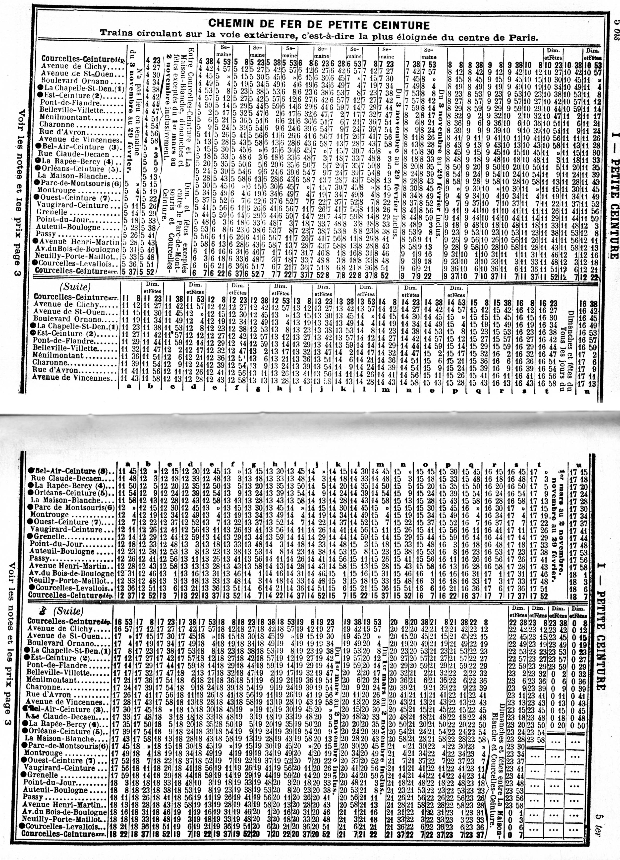 Horaires de la Petite Ceinture en mai 1914 - Livret Chaix